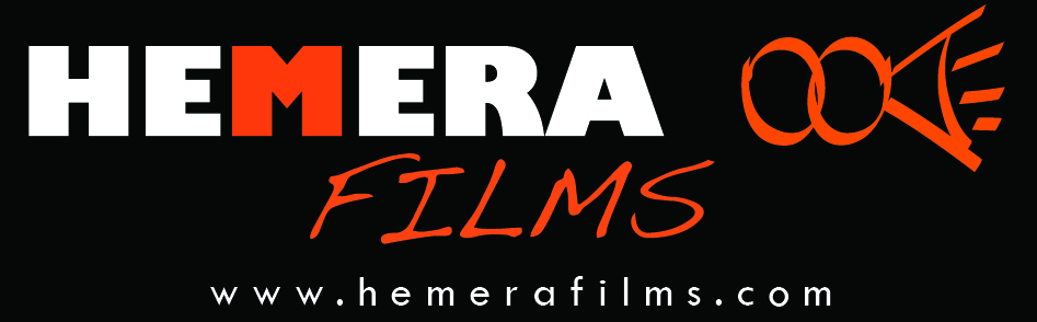 Logo Hemera Films